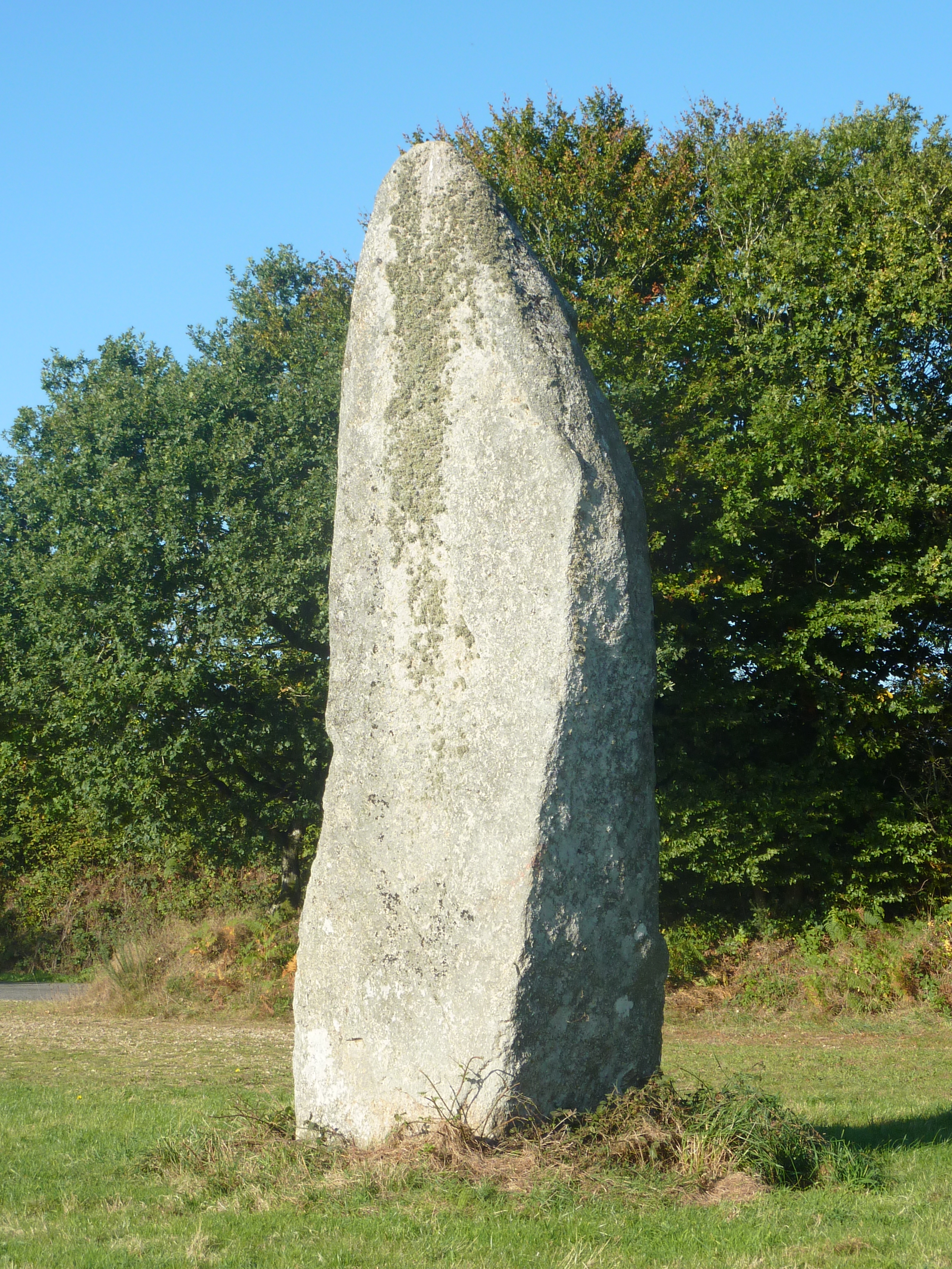 Plougonven : l'un des deux menhirs de Pont-ar-Illis